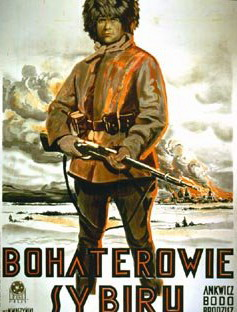 Афиша кинофильма "Герои Сибири" (Польша, 1936)